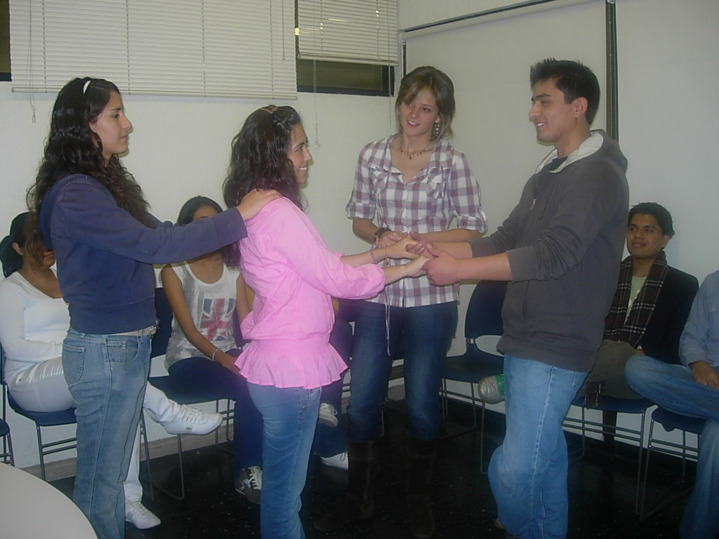 Ejemplo de una sesión de terapia de constelación familiar.